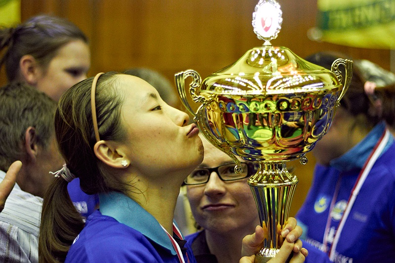 Li Qian z pucharem Drużynowego Mistrza Polski w Tenisie Stołowym, zdobytym w sezonie 2011/2012 z klubem KTS Zamek-OWG Tarnobrzeg.